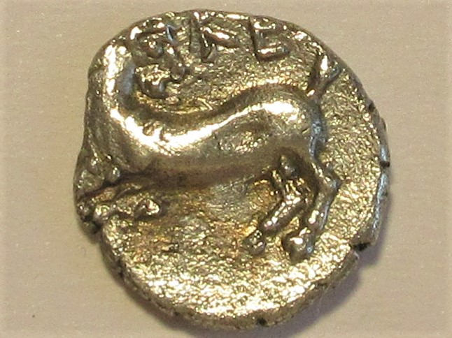 Rückseite des Obol mit Ziege und KE, Szaivert/Sear Nr. 5660